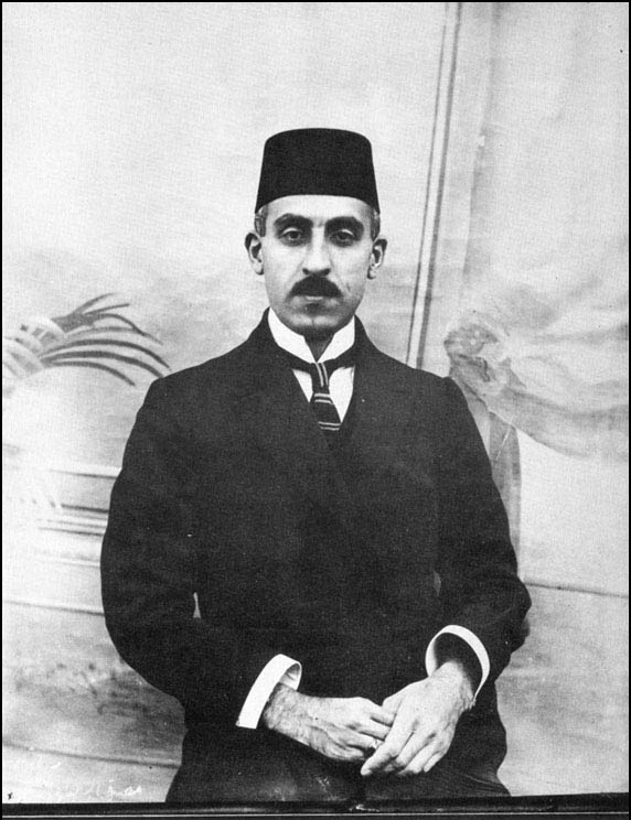 Mohammad Mossadegh, alors gouverneur du Fars, dans les années 1920